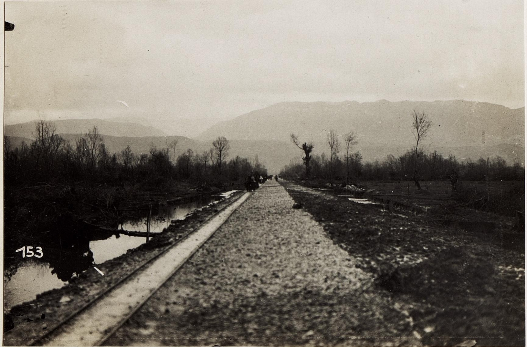 Neu angelegte Strasse nach Vora, Albanien.